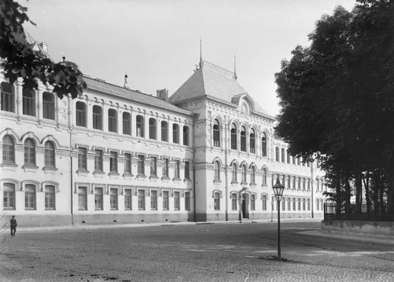 Выборгское реальное училище после перестройки